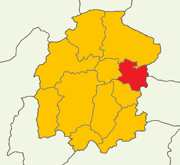 Kahramanmaraş'ta 2014 Türkiye cumhurbaşkanlığı seçimi